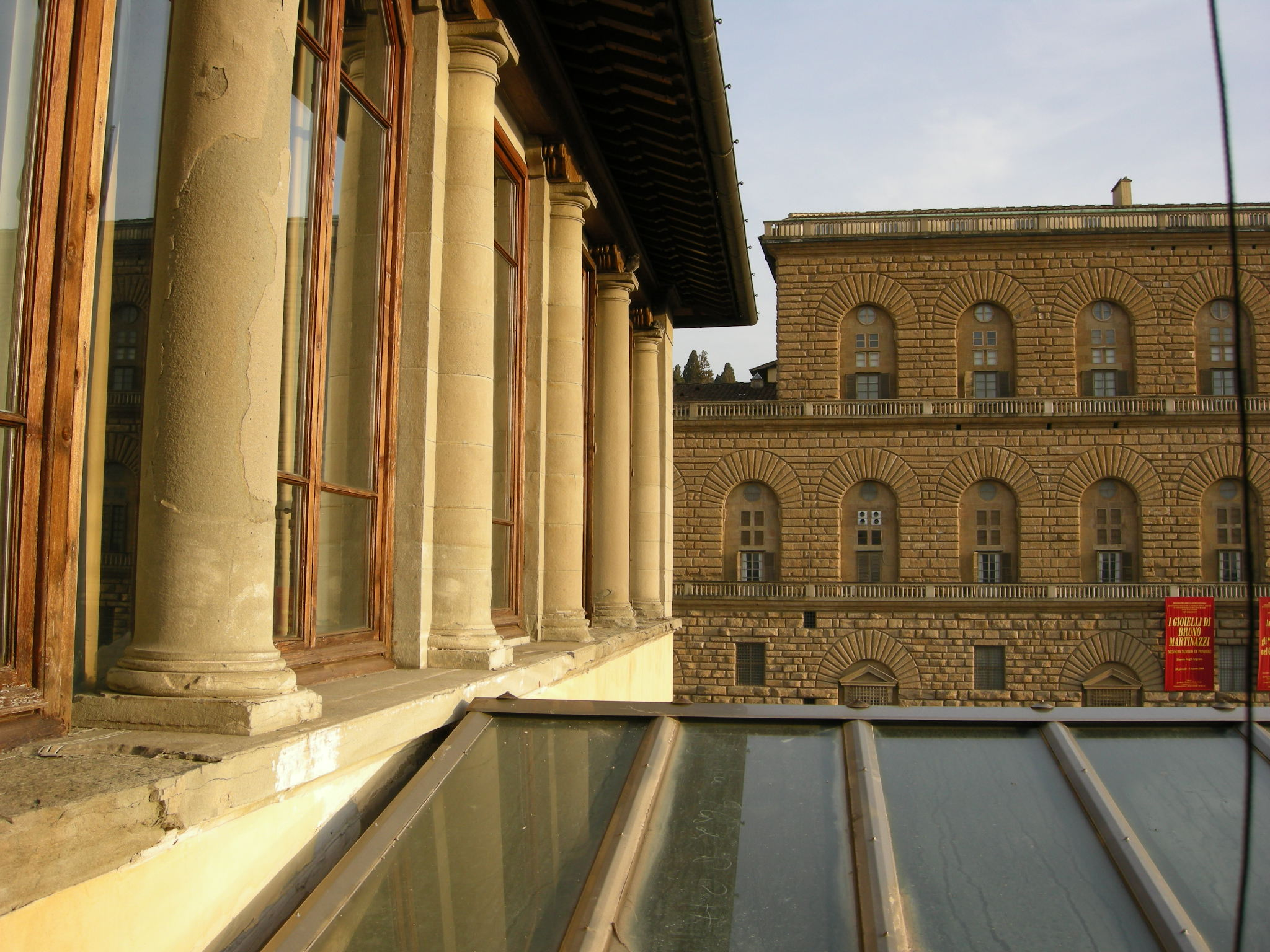 Palazzo temple leader, loggia